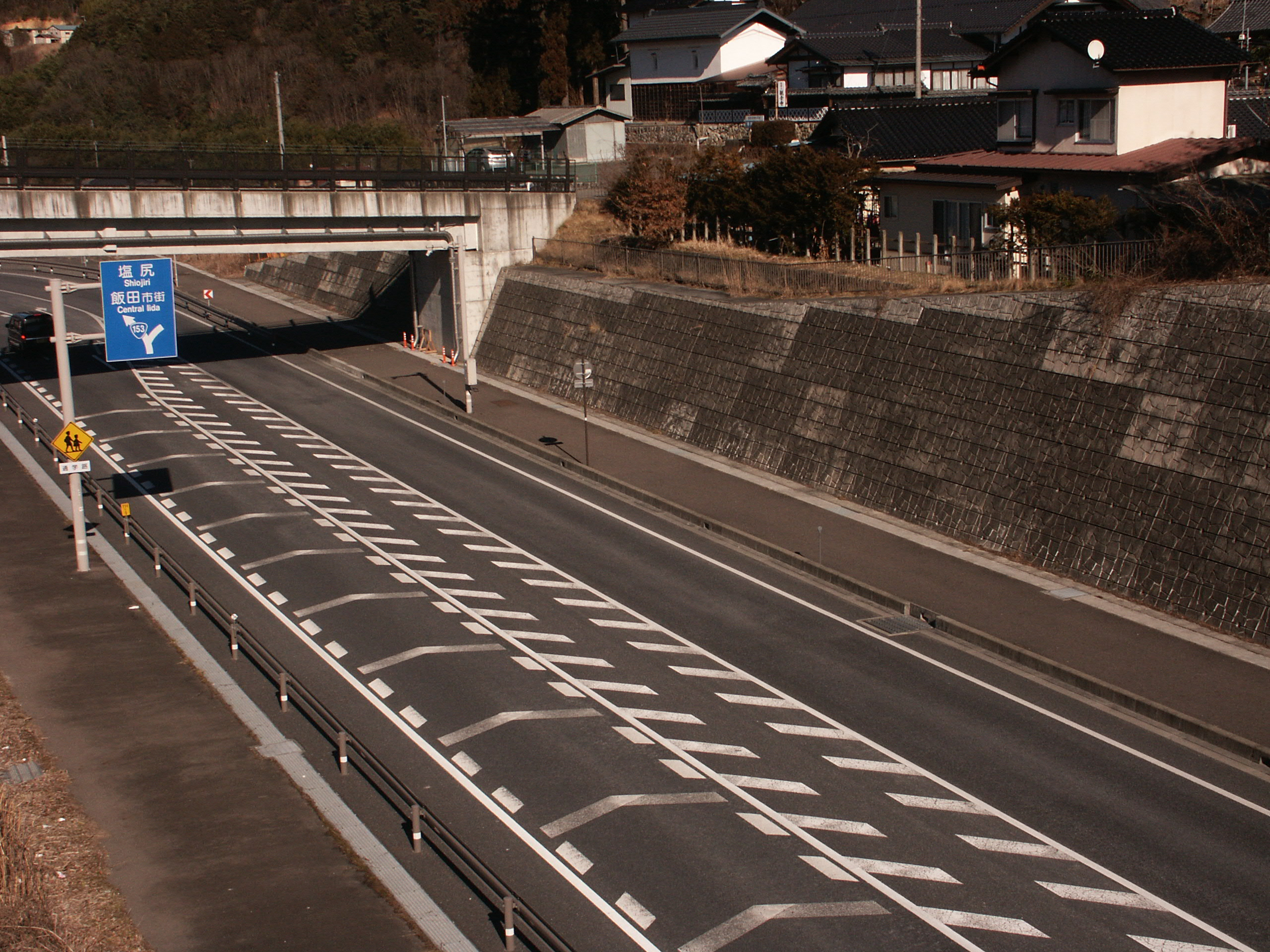 国道153号線山本小学校北交差点付近（国道153号線の擁壁と民家側に建設された中津川線跡地の擁壁と柵を撮影）